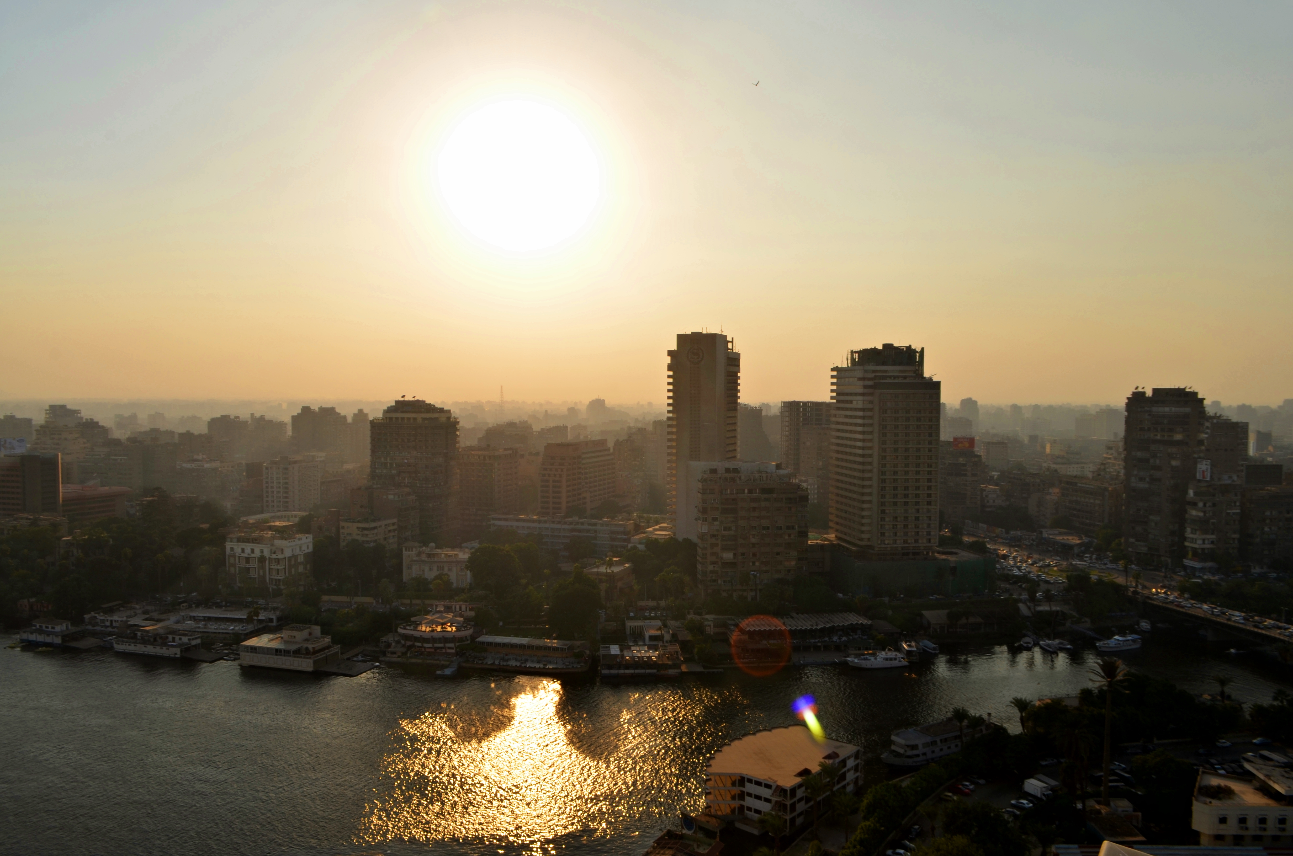 مدينة الجيزة، وجزء من جزيرة الزمالك بالقاهرة، مصر